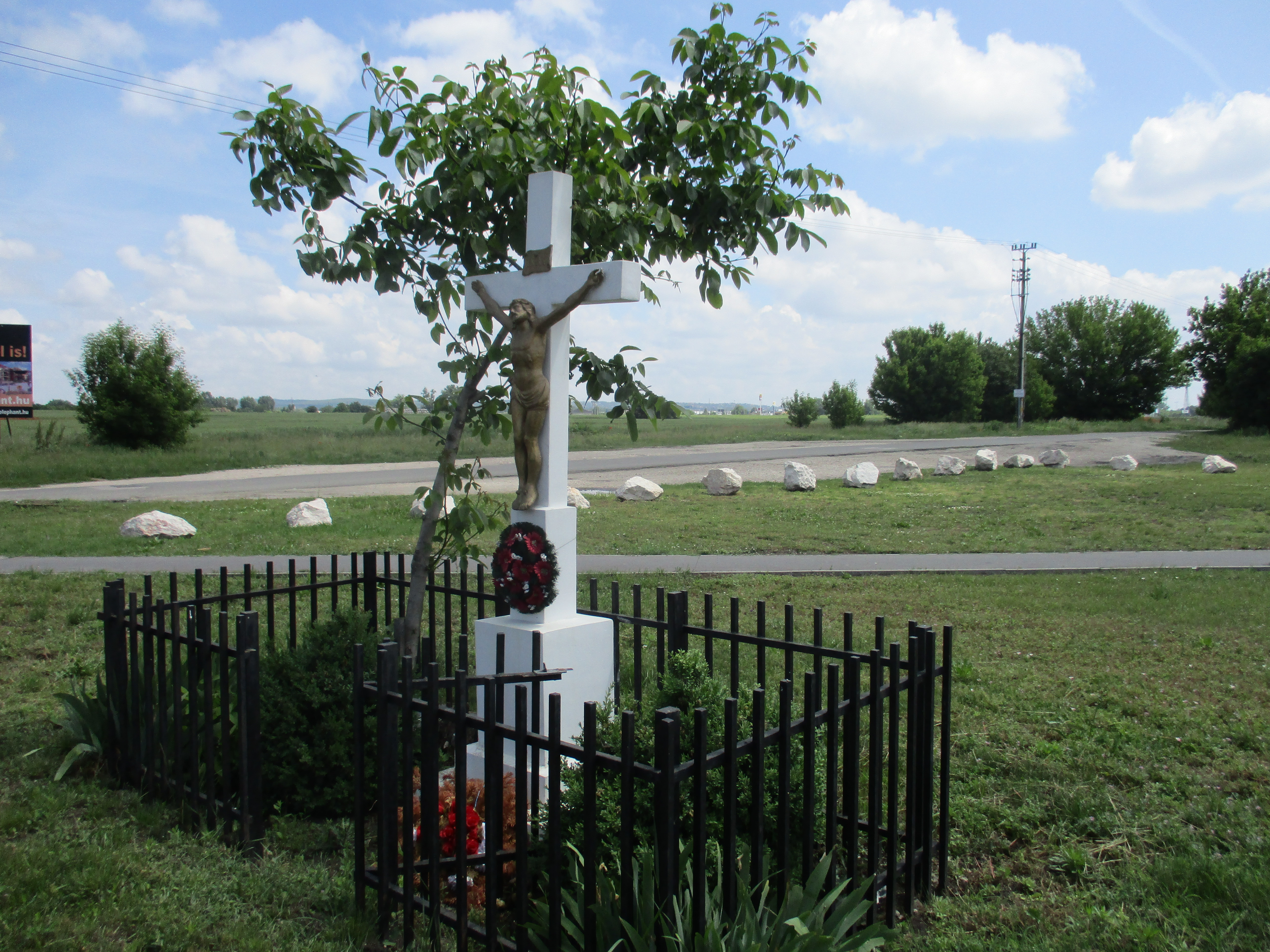 Kőkereszt a Külső Fóti úton, a képen a háttérben a Mogyoród útja húzódik, Budapest, XV. Külső Fóti út 1. (Mogyoród útja sarkán)